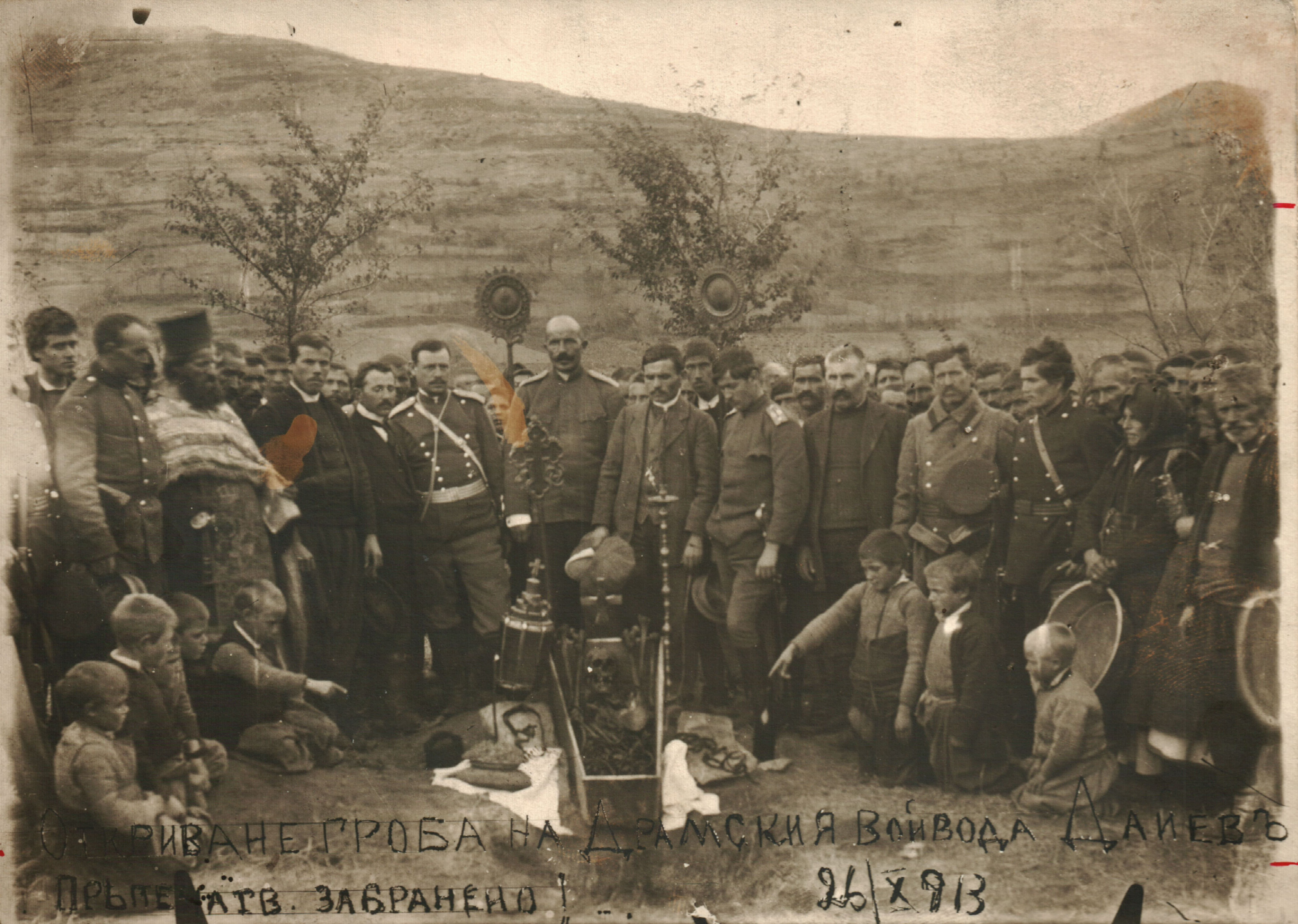 Снимка на гроба на Михаил Даев.